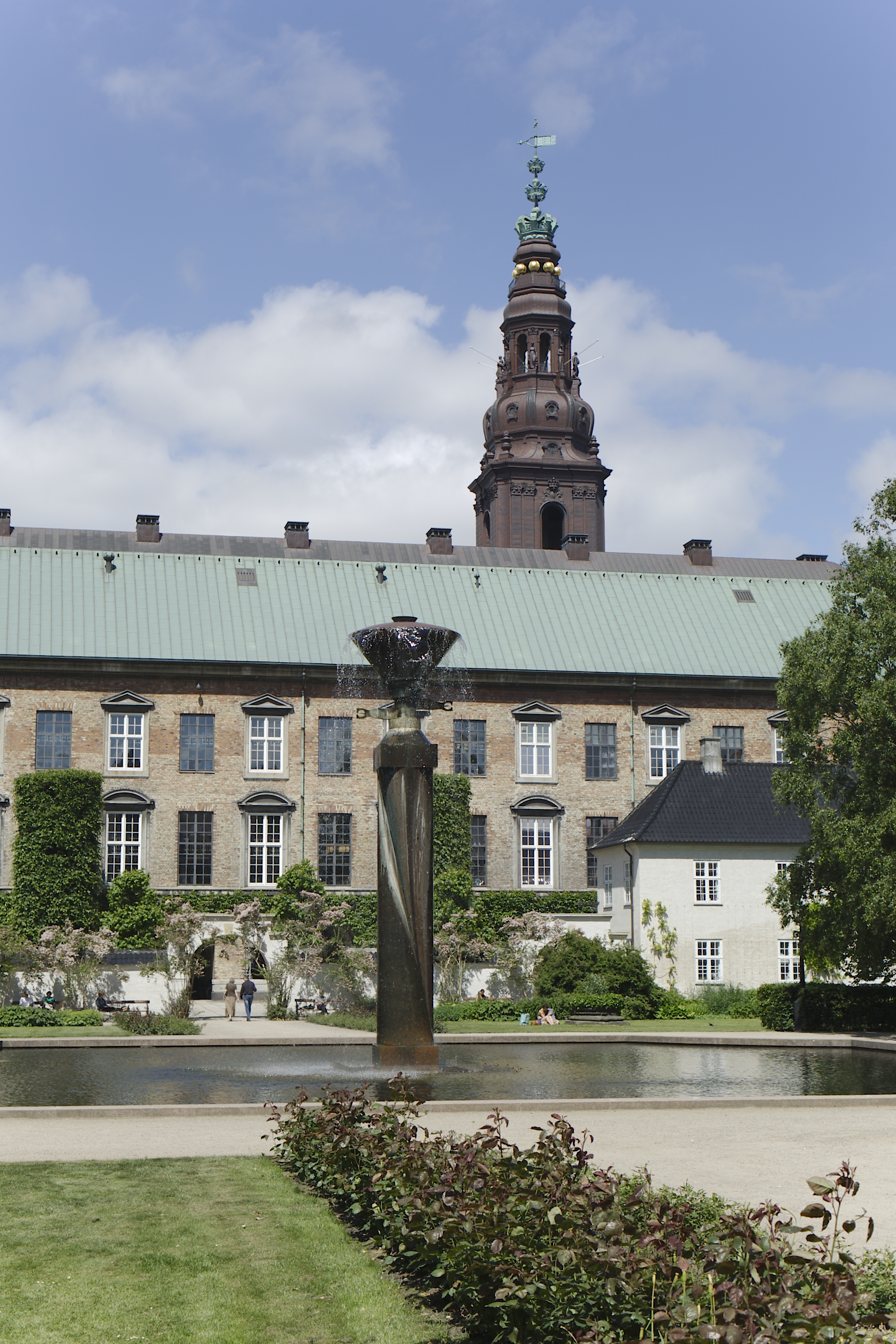 Det Kongelige Biblioteks Have med spiret på Christiansborg i baggrunden